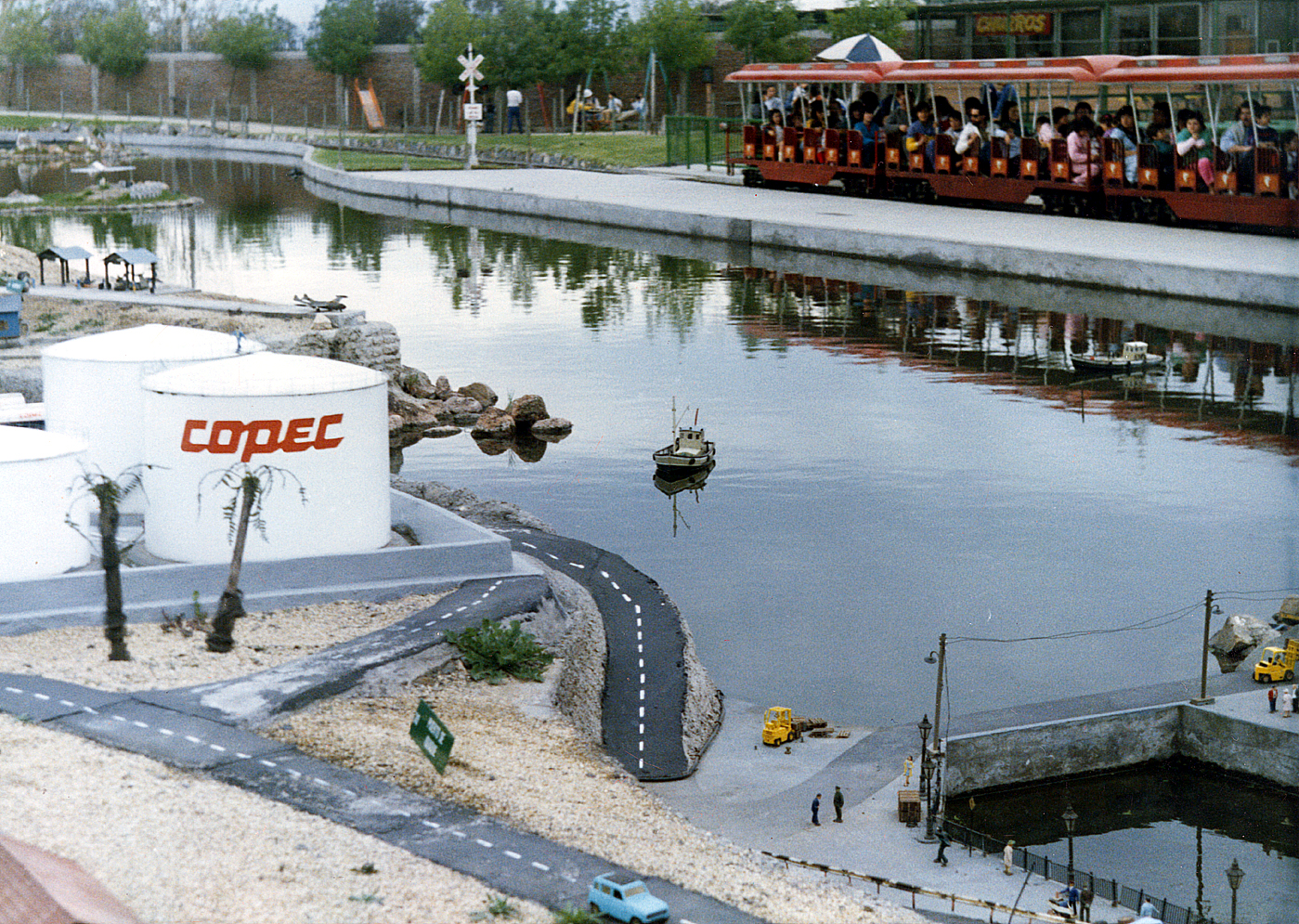 Parque en miniatura Mundomágico en Santiago de Chile. La imagen fue tomada en el año 1987.